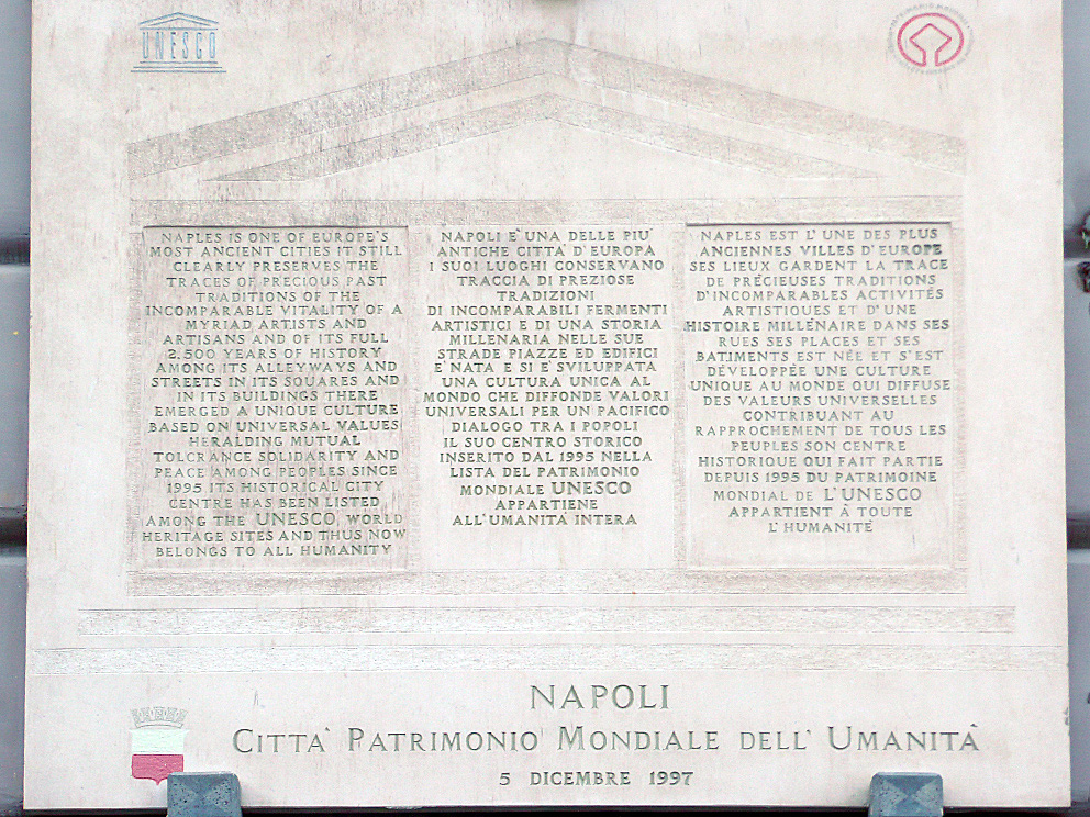 targa UNESCO in Piazza del Gesù Nuovo in Napoli